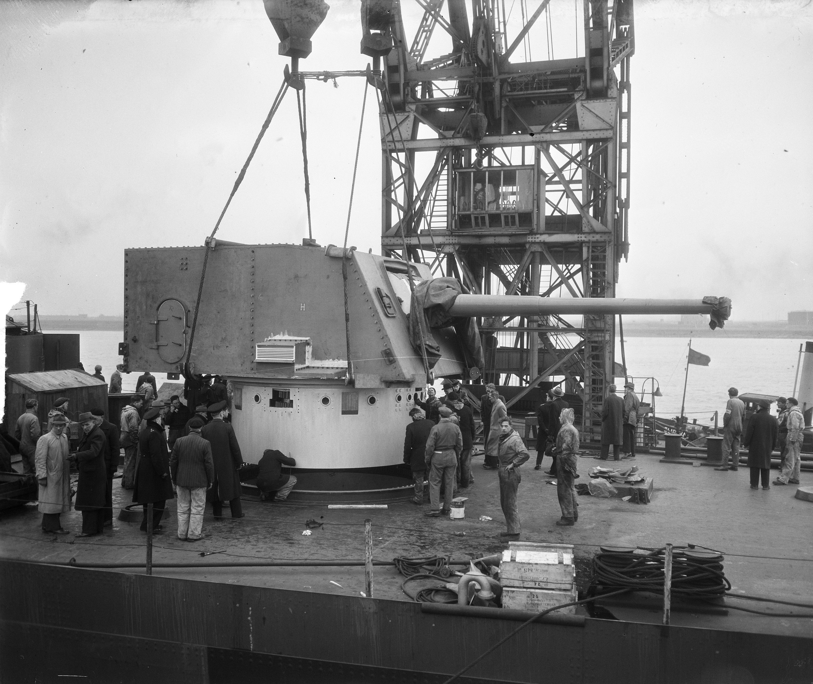 Collectie / Archief : Fotocollectie Anefo Reportage / Serie : [ onbekend ] Beschrijving : Geschut op kruiser De Ruijter bij Wilton-Fijenoord Datum : 9 maart 1951 Locatie : Schiedam Trefwoorden : marine, scheepsbouw, scheepswerven Instellingsnaam : Wilton-Fijenoord Fotograaf : Duinen, […] van / Anefo Auteursrechthebbende : Nationaal Archief Materiaalsoort : Glasnegatief Nummer archiefinventaris : bekijk toegang 2.24.01.09 Bestanddeelnummer : 904-4694